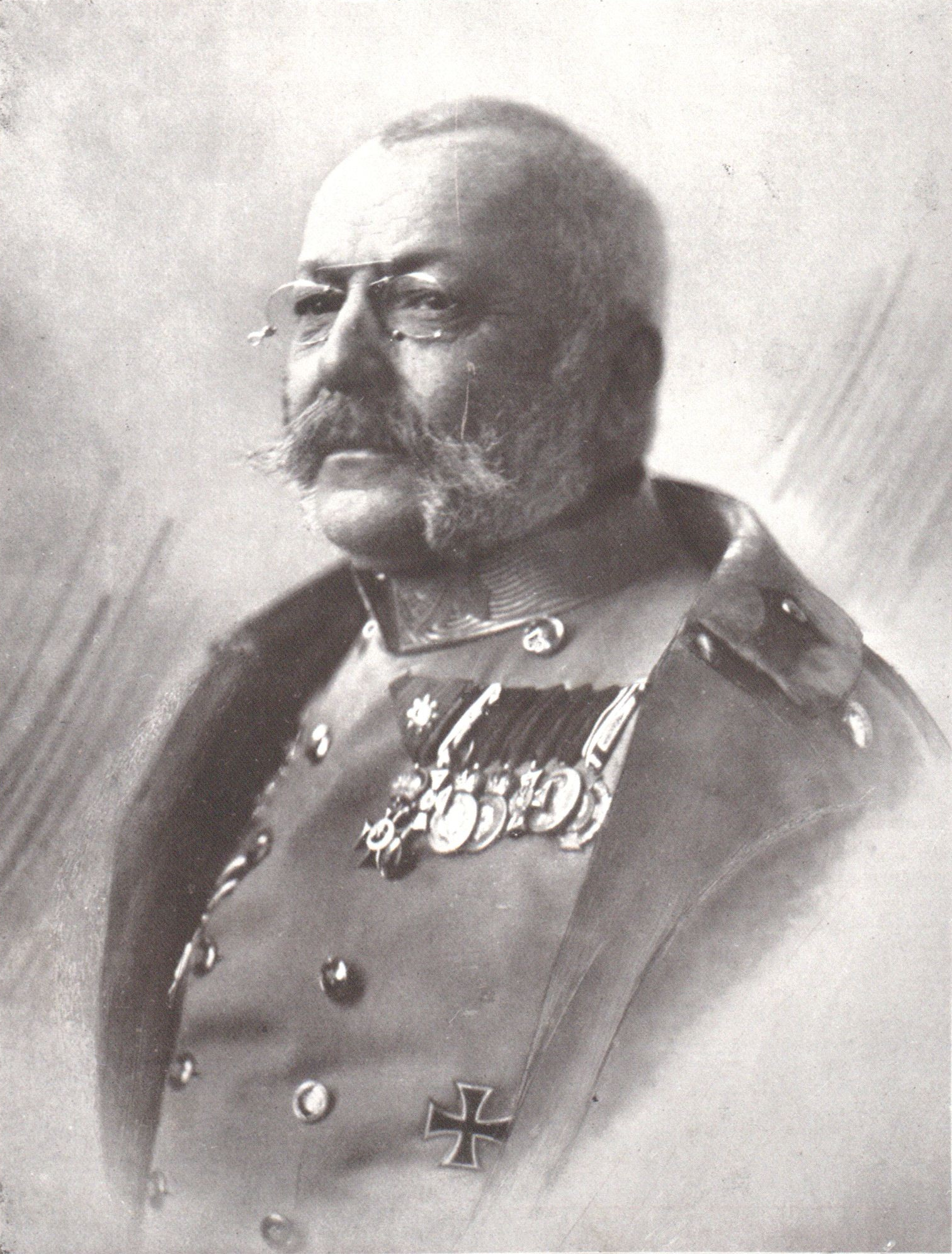 „Se. k. und k. Hoheit Armee-Oberkommandant Feldmarschall Erzherzog Friedrich“